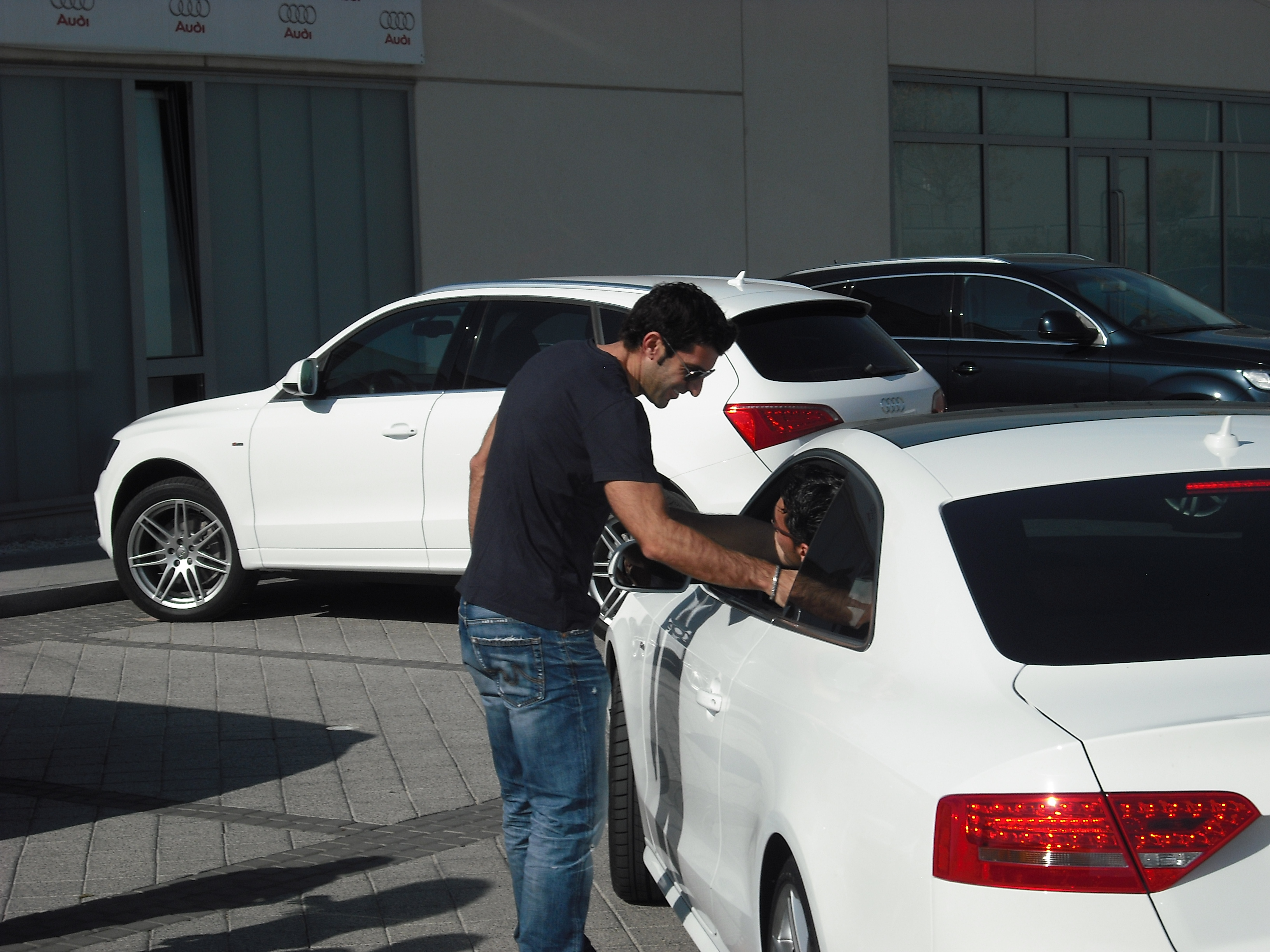 Luis Figo de visita al médico del Madrid